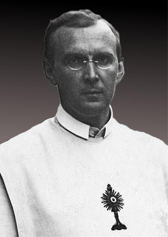 Biskup Klemens Maria Filip Feldman-zwierzchnik Kościoła Starokatolickiego Mariawitów w latach 1935-1945